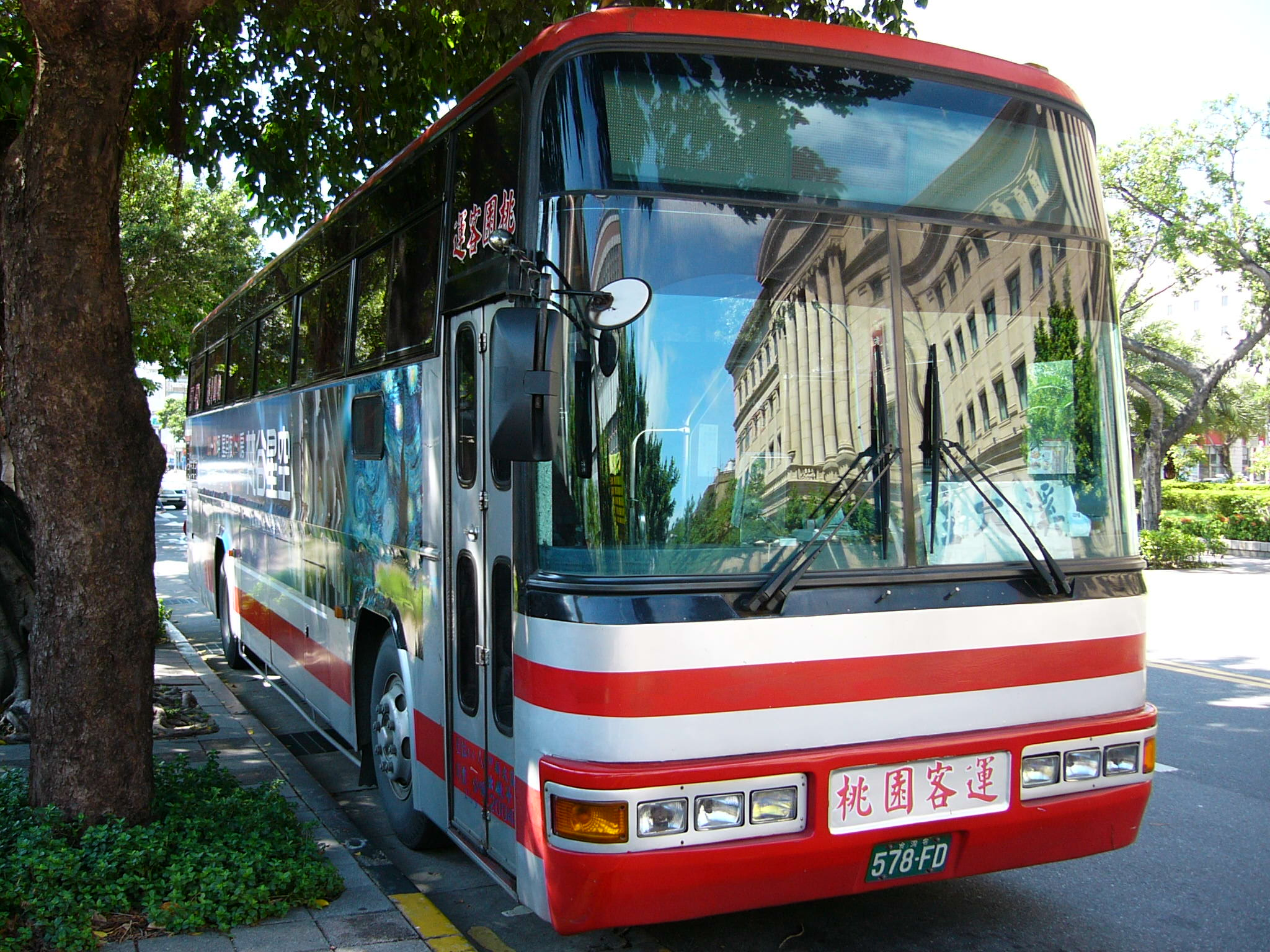 桃園客運的日野ERK1JRL大客車578-FD右前方外觀